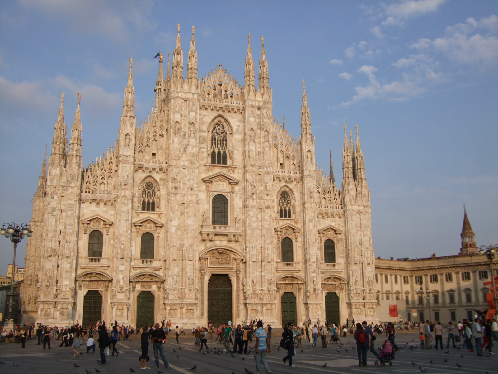 Catedral (Duomo) de Milão